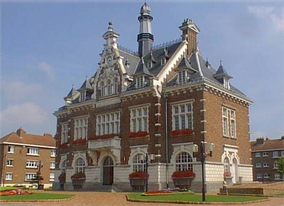 La mairie de Houplines, France